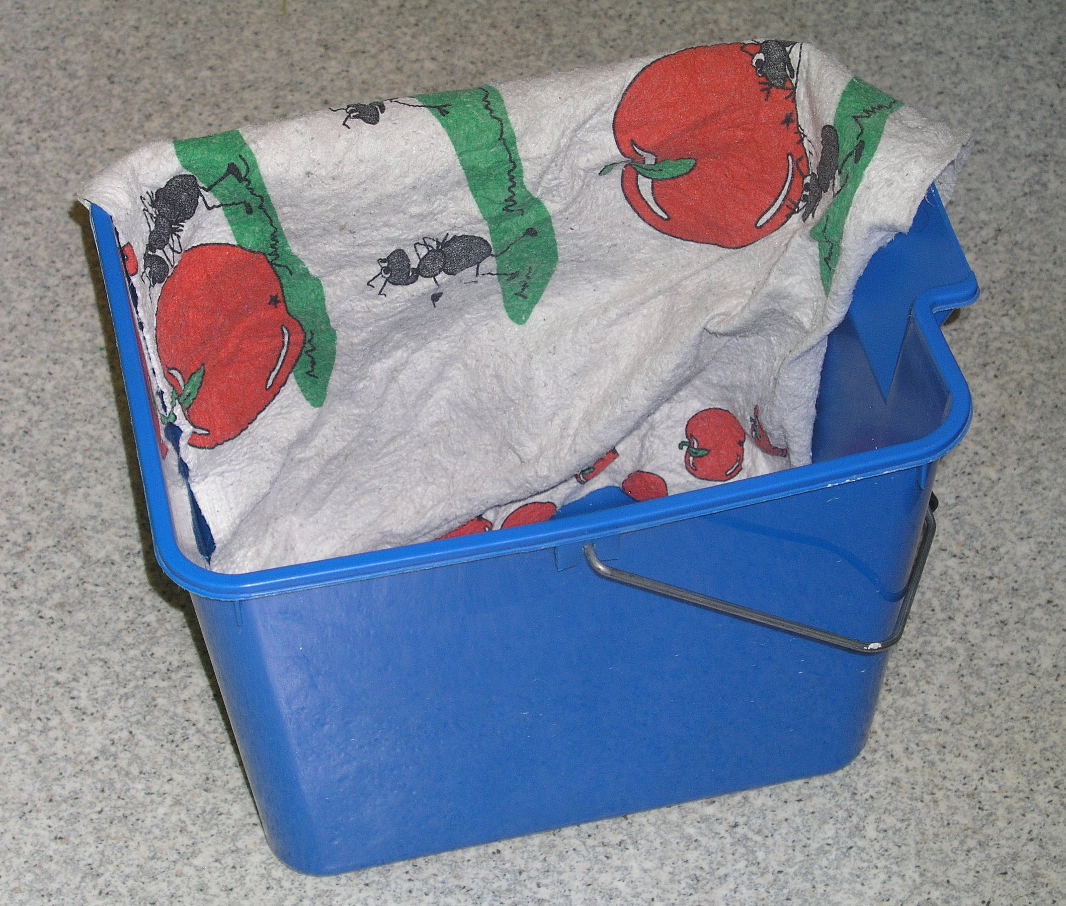 Gulvspand med gulvklud